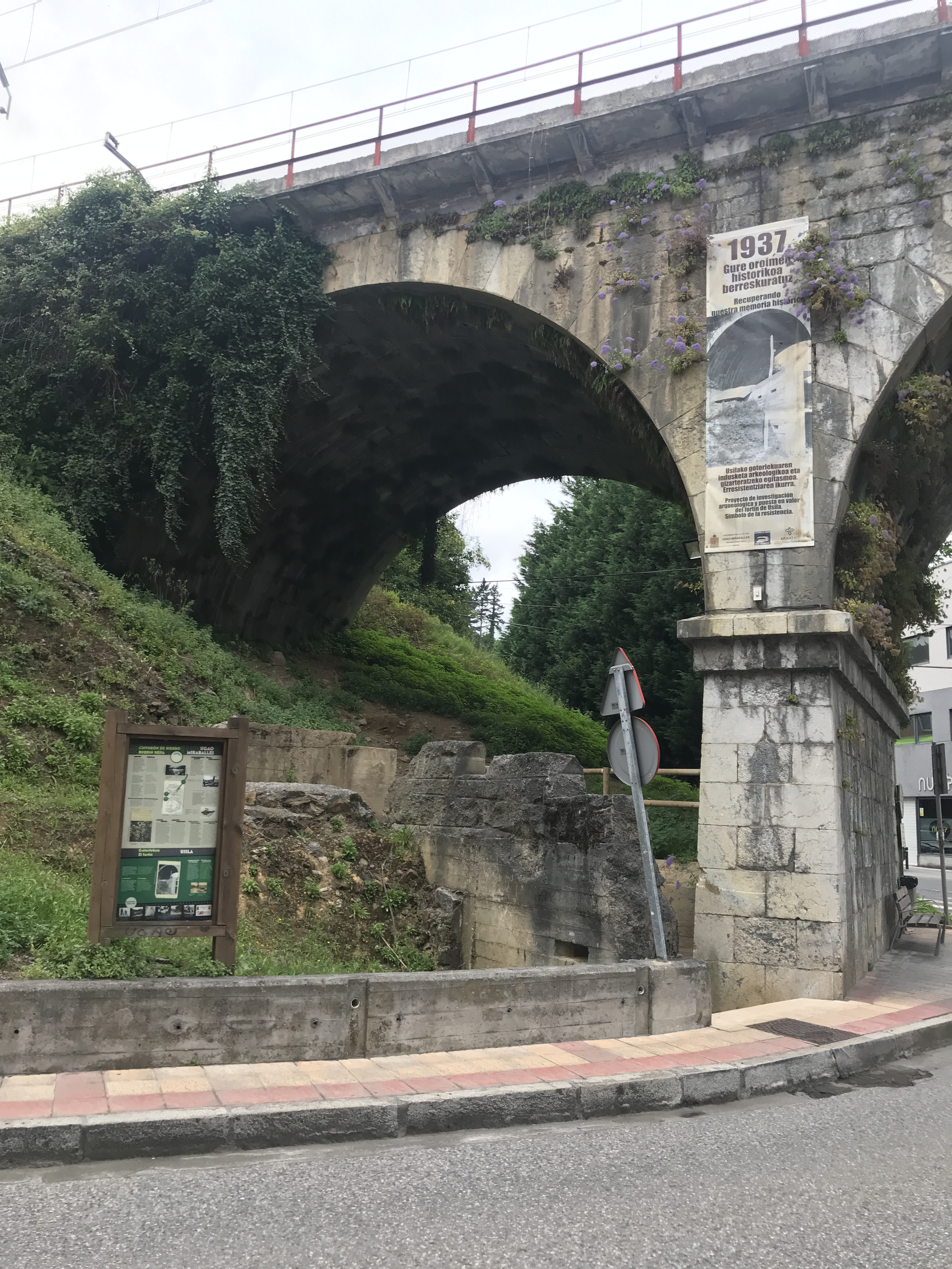 Fortín de Usila, bajo el puente del ferrocarril de Usila, es una defensa perteneciente al Cinturón de Hierro que rodeaba Bilbao en la Guerra Civil Española.